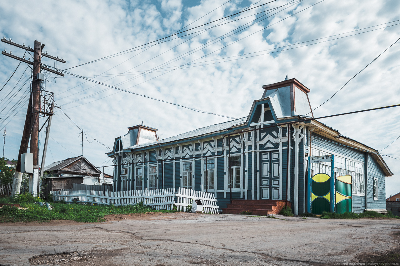 Здание старой почты (конец XIX - начало ХХ века), Богатое, Самарская область, Россия